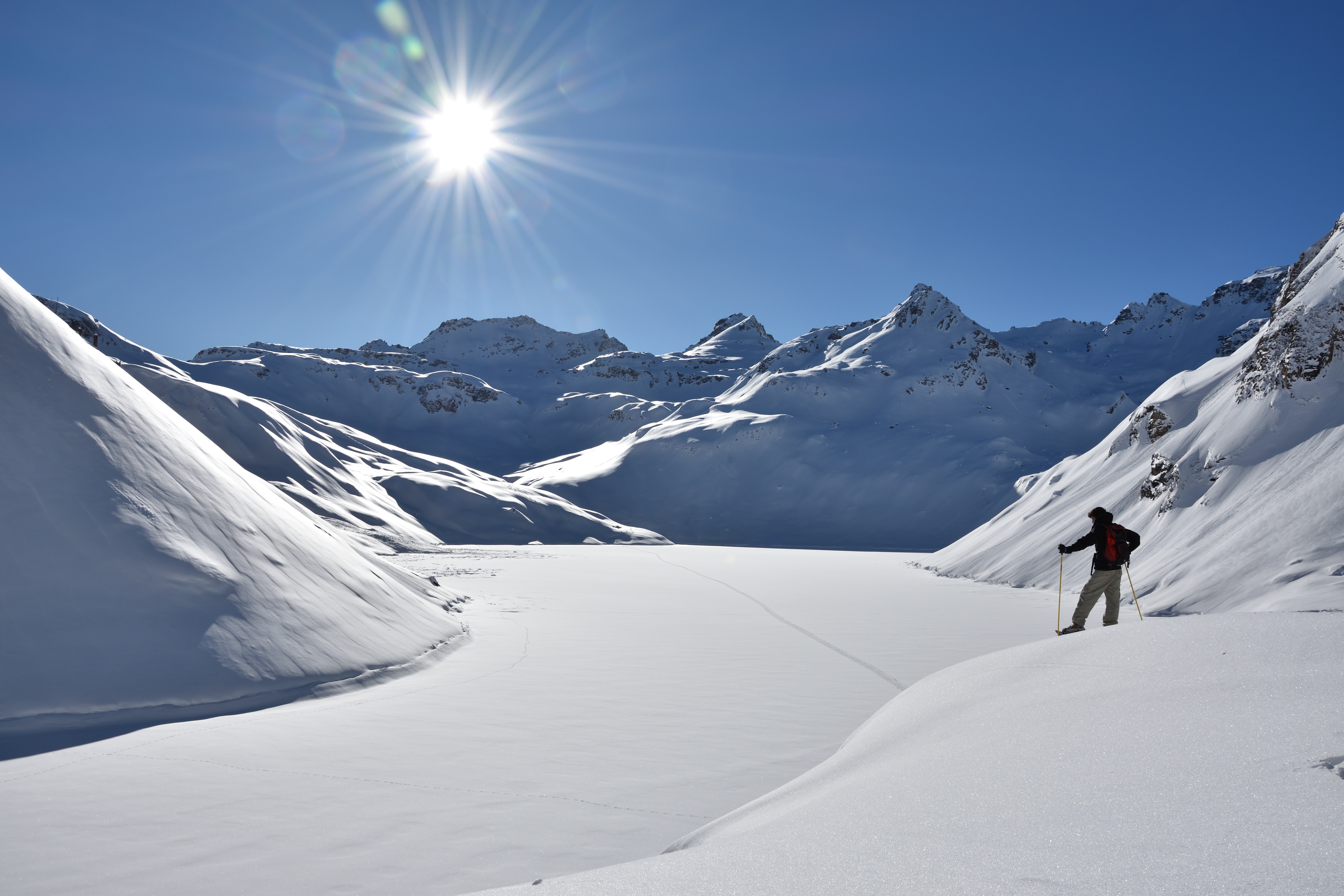 Val Formazza (Q47091779)